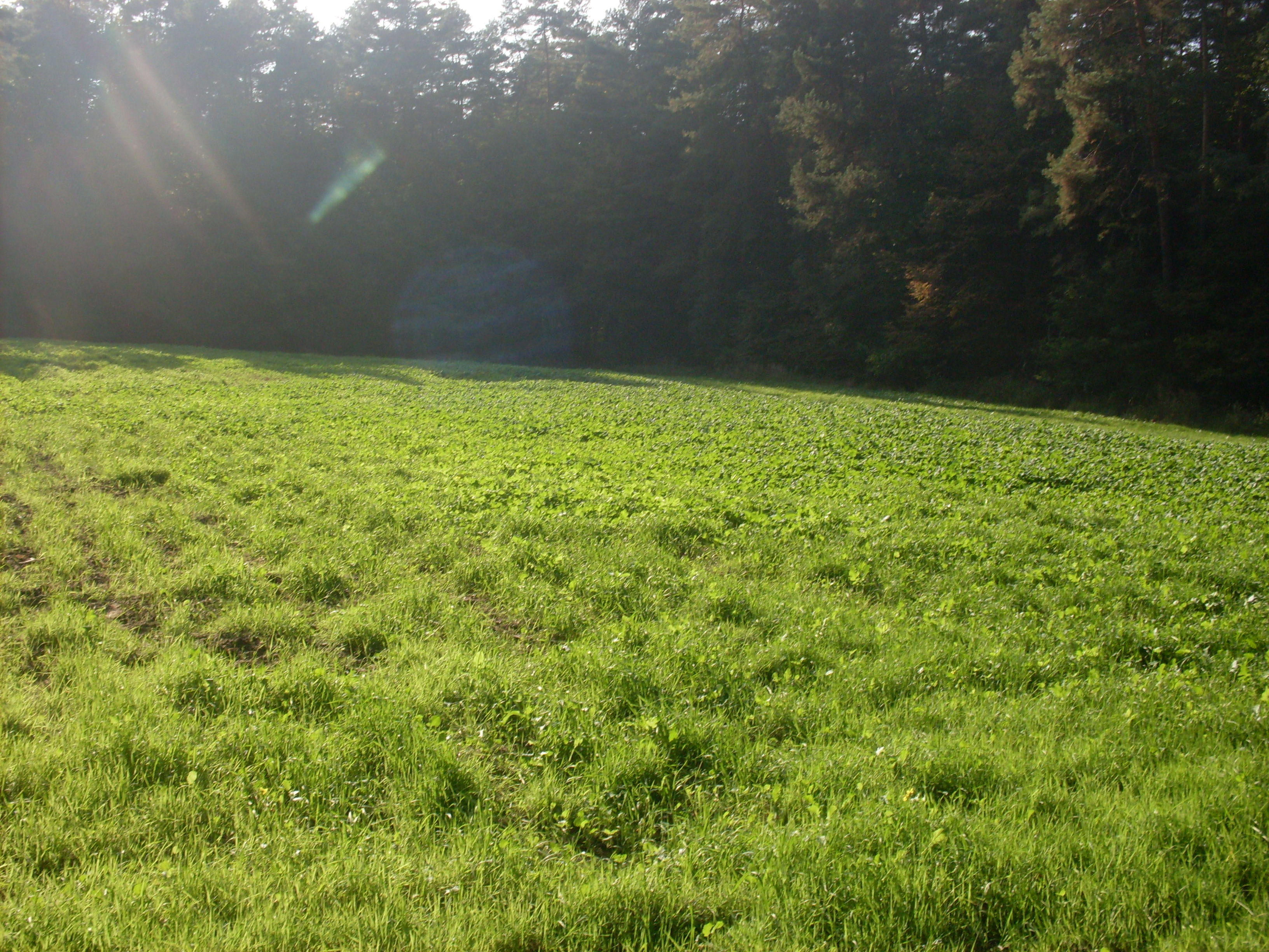 Celiny.Las Zwierzyniecki k.Doliny Borowca.Grzbiet Tenczyński